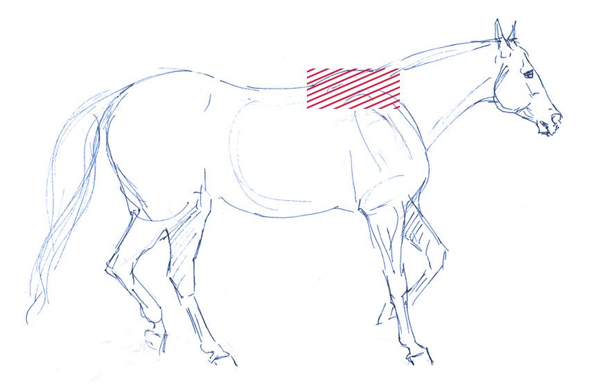 widerristbereich